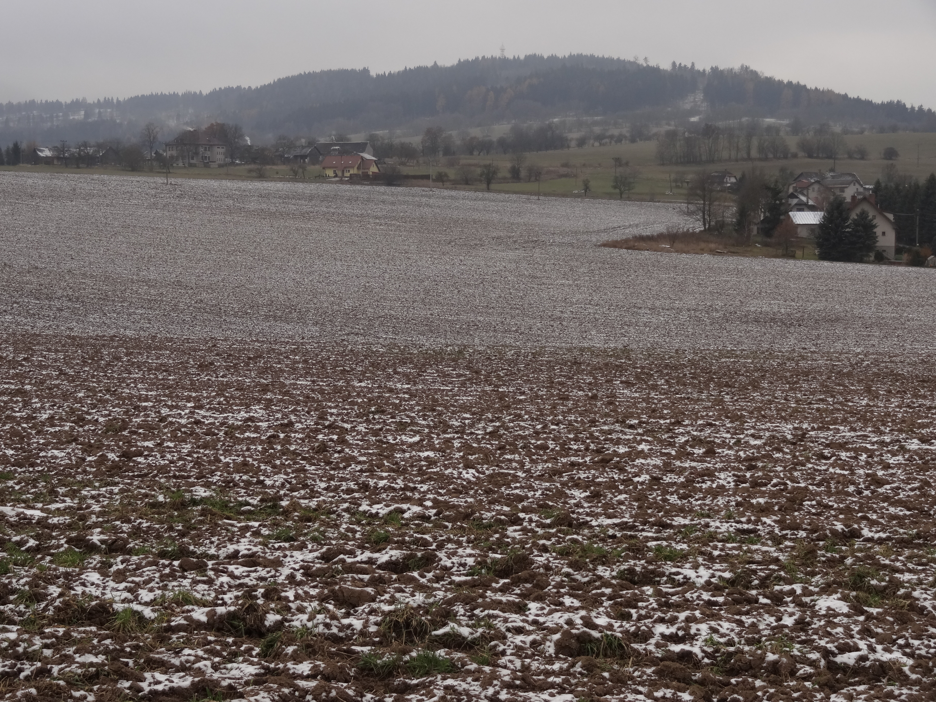 Záhoří a Pipice s Kozákovem